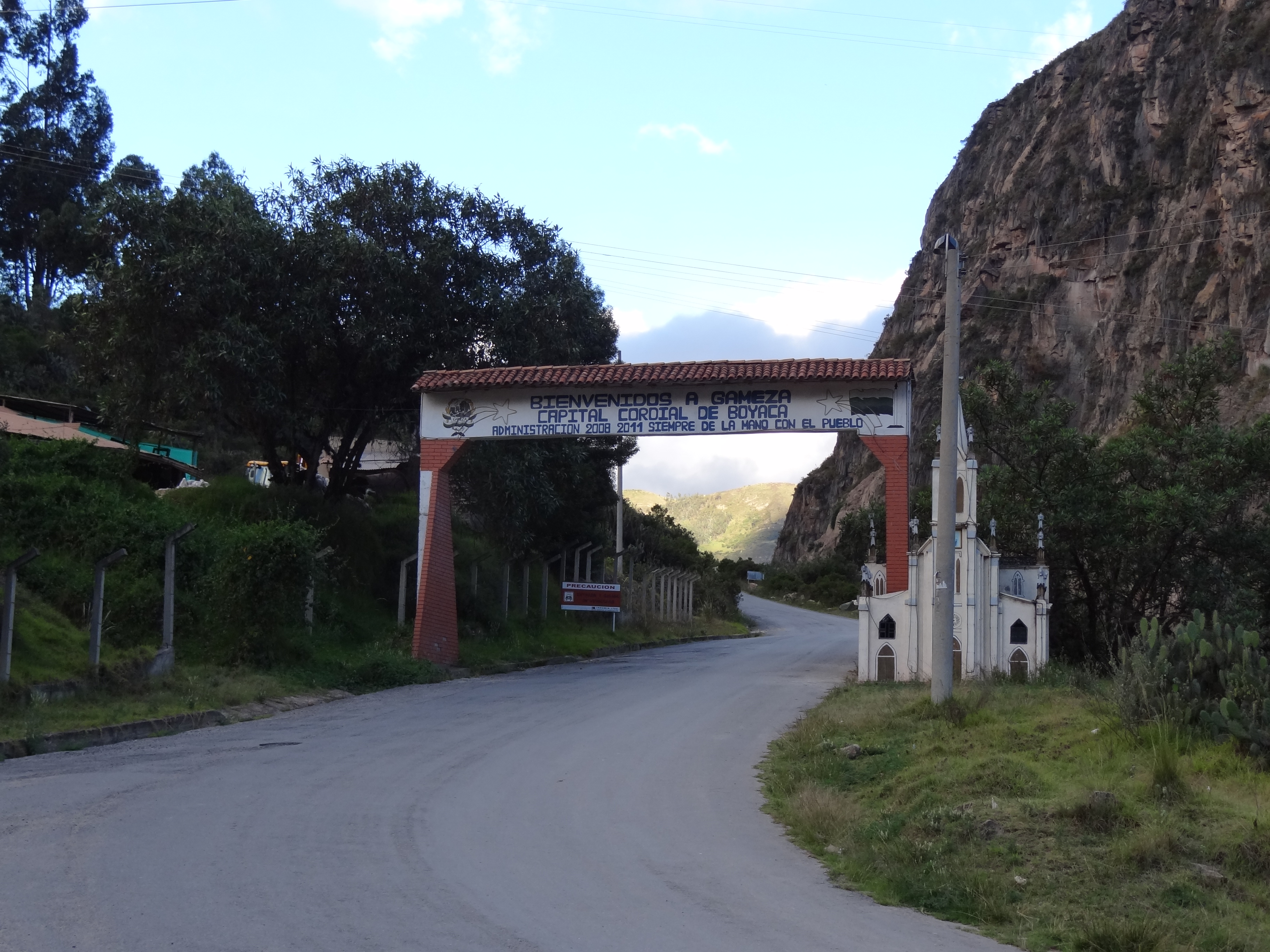 Entrada a Gámeza, cerca al límite entre los municipios de Gámeza y Tópaga, departamento de Boyacá, Colombia